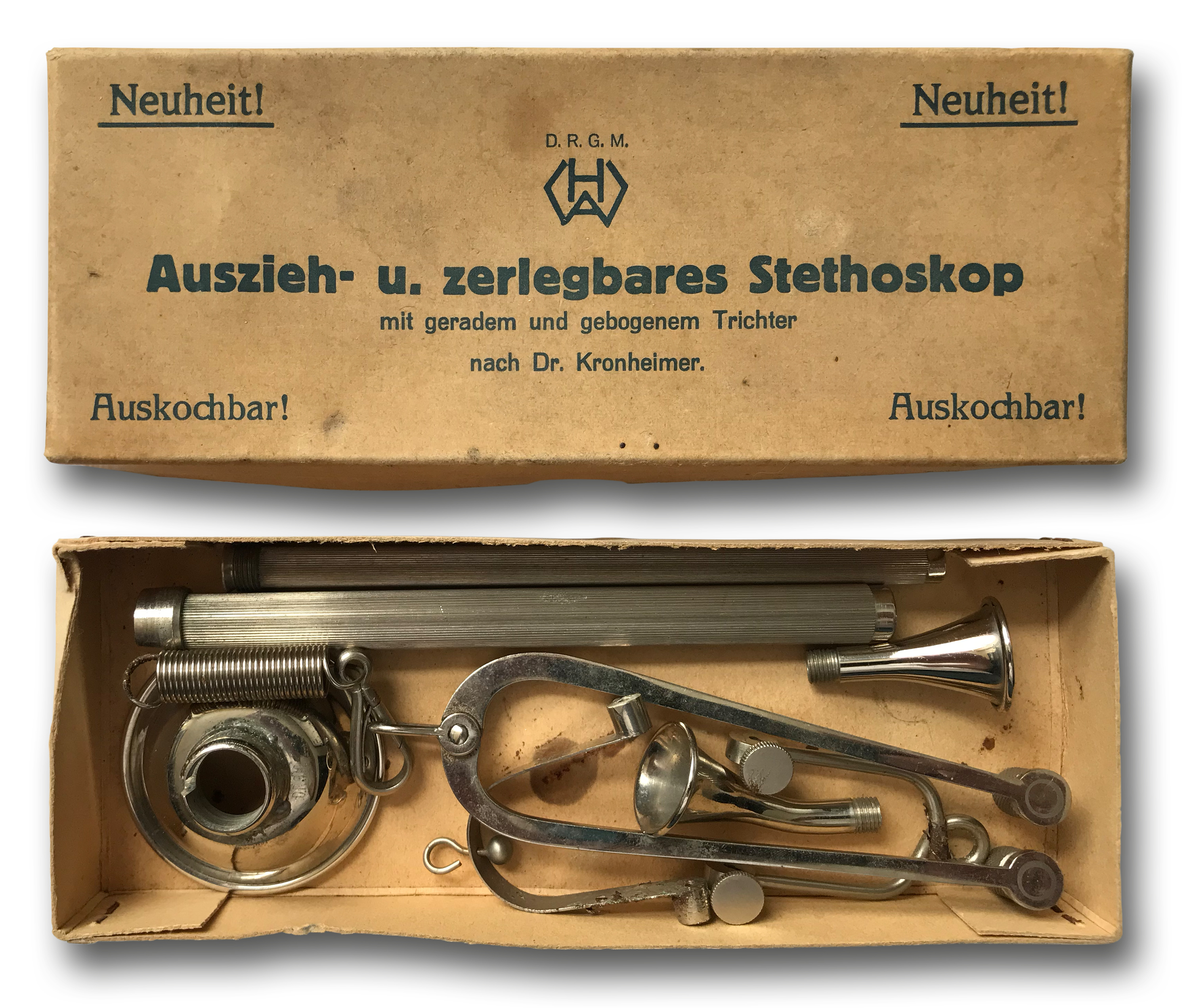 Auszieh- und zerlegbares Stehtoskop nach Dr. Kronheimer (D.R.G.M.) in der Originalverpackung.